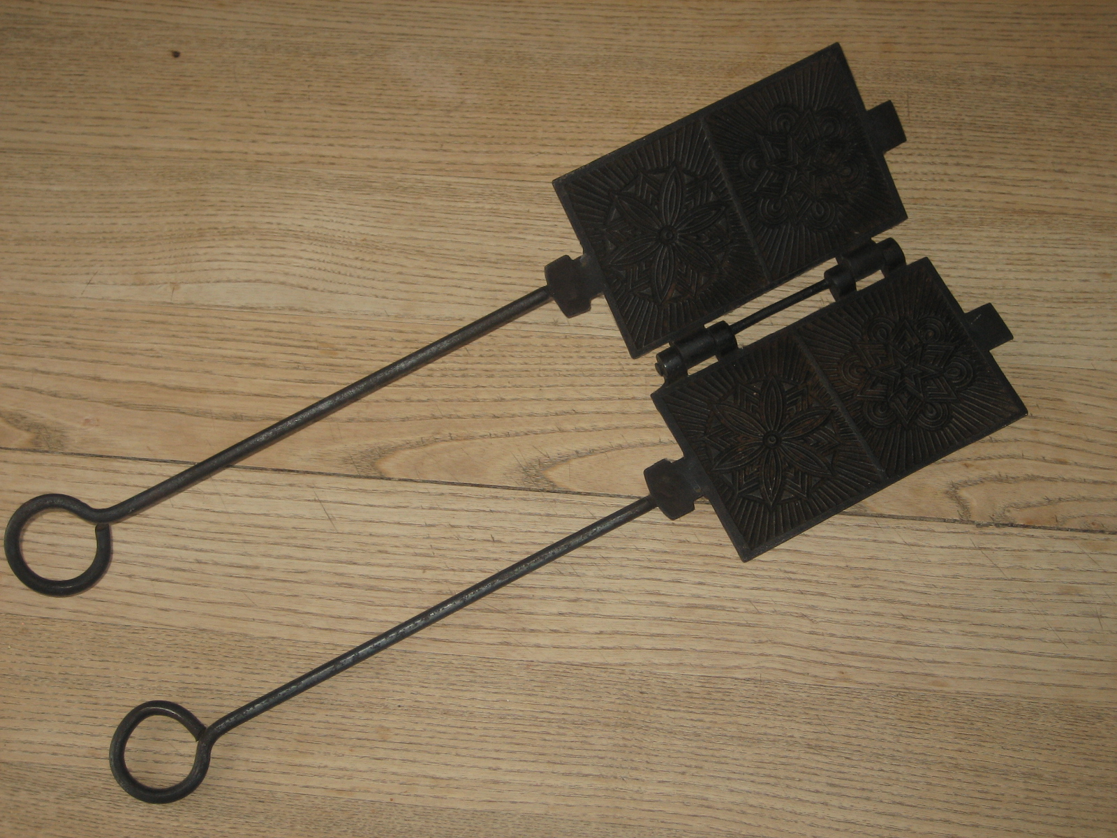 a waffle iron